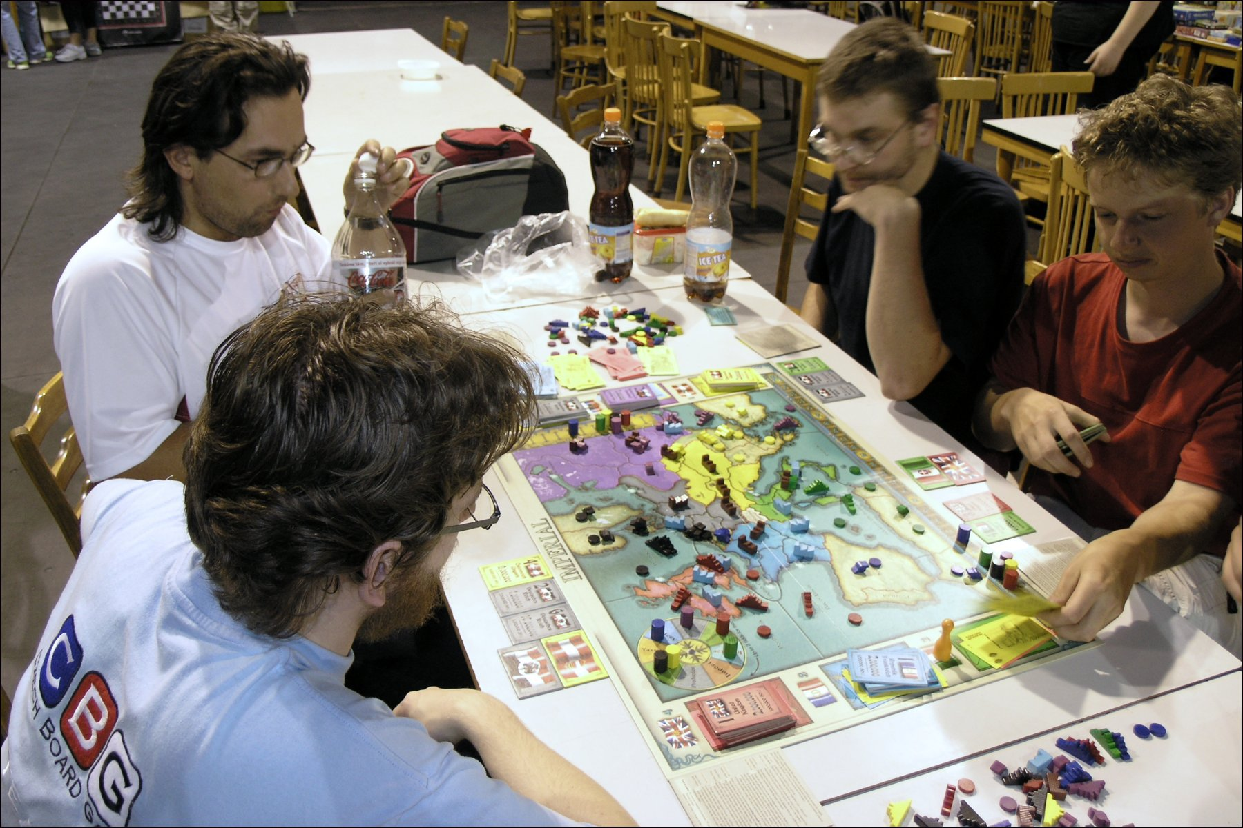 GameCon 2007 in Pardubice - Imperial